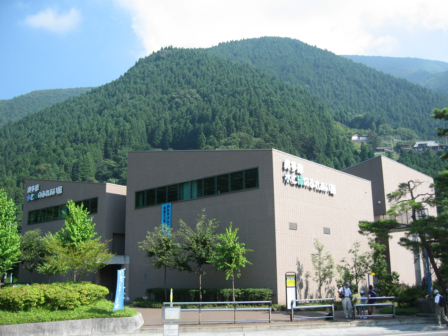 Okutama Mizu-to-Midori-no-Fureaikan. Located beside Lake Okutama, Okutama, Tokyo.